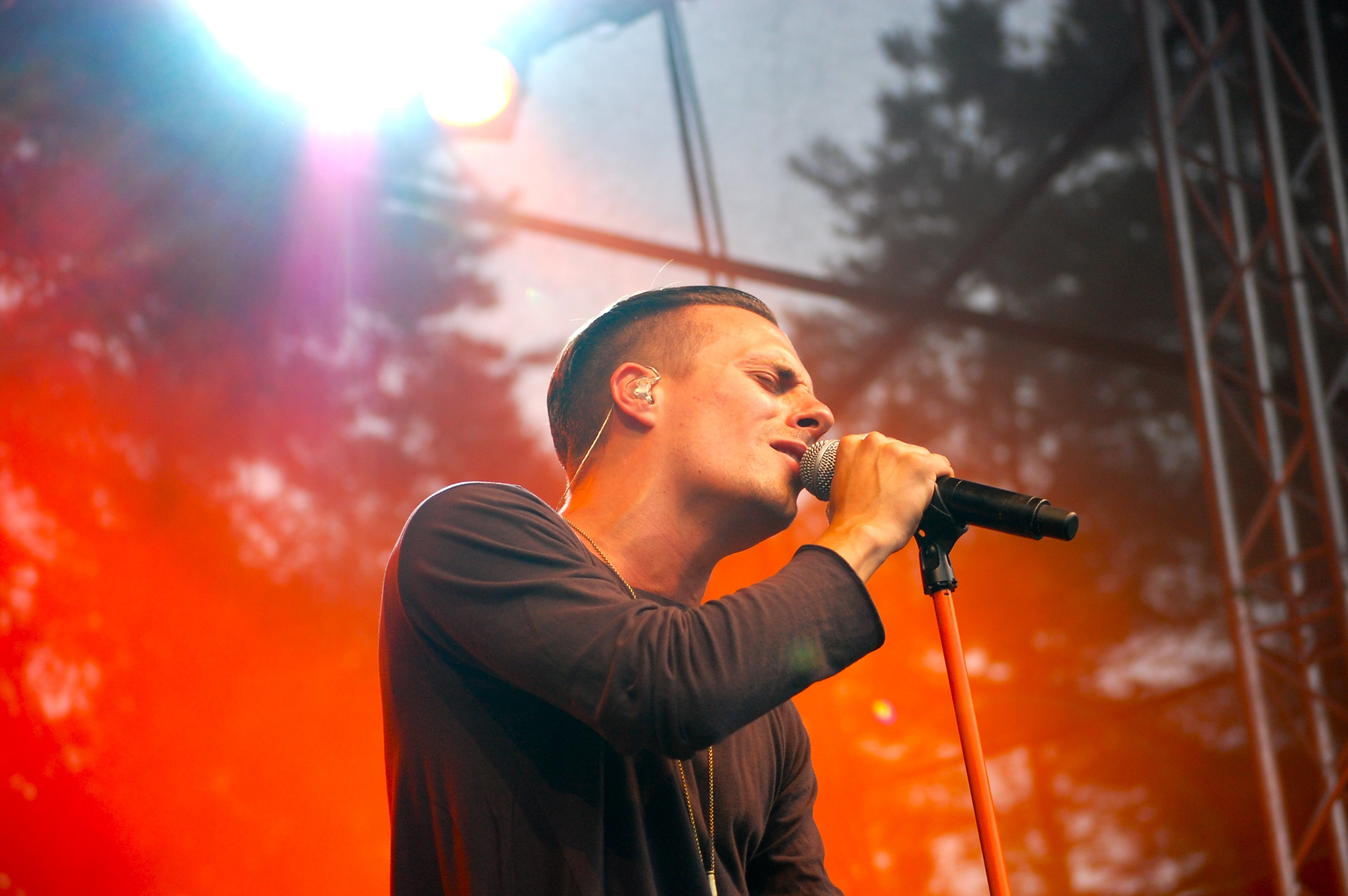 Oskar Linnros